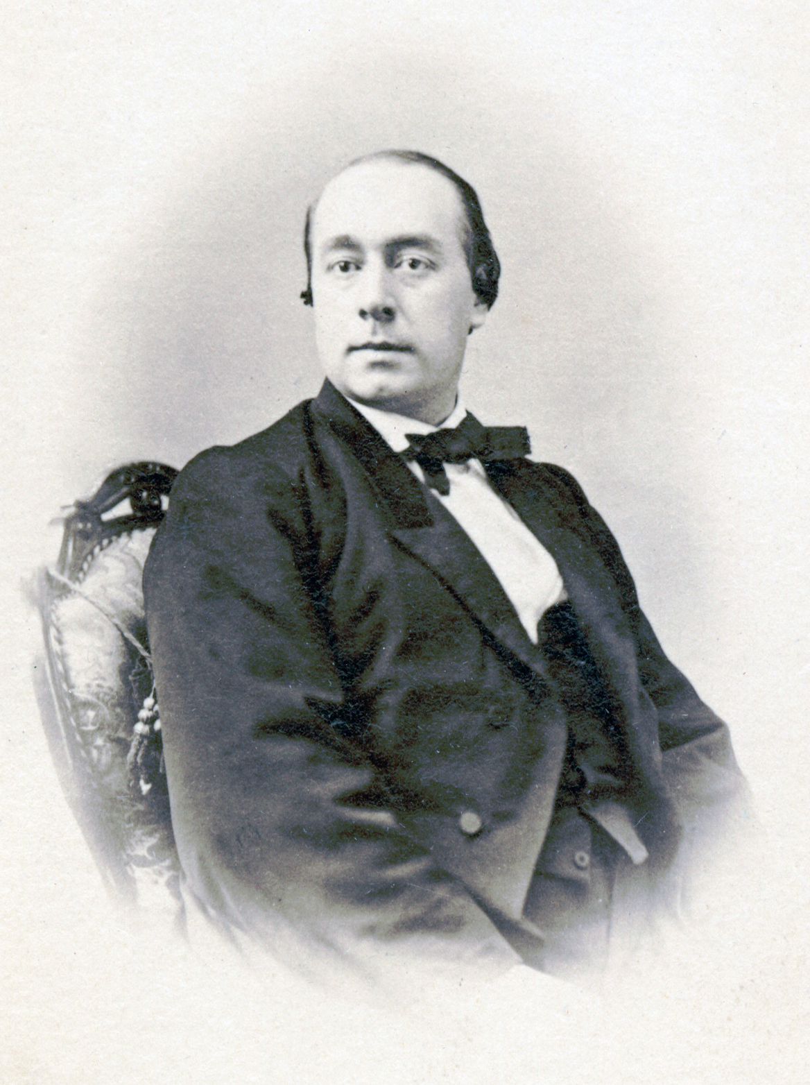 August Berndt, direktör för Mindre teatern 1880